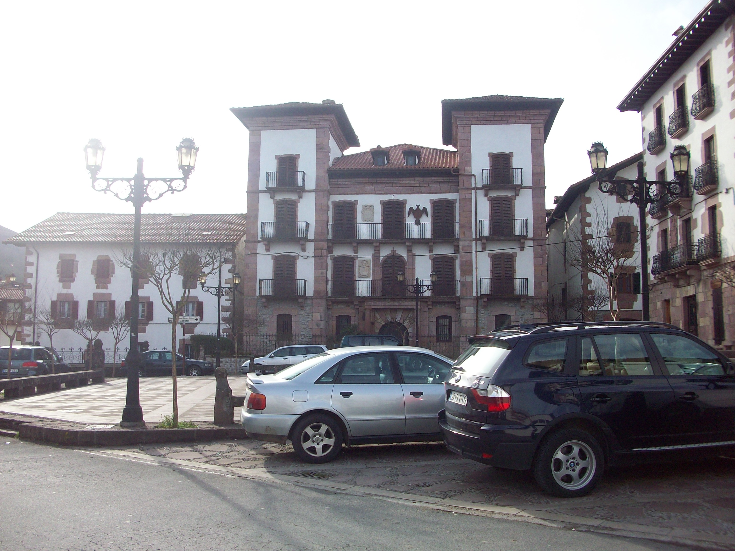 Baztango Irurita herriko plaza nagusia. Nafarroa, Euskal Herria. Main square of Irurita village, in Baztan. Navarre, Basque Country.